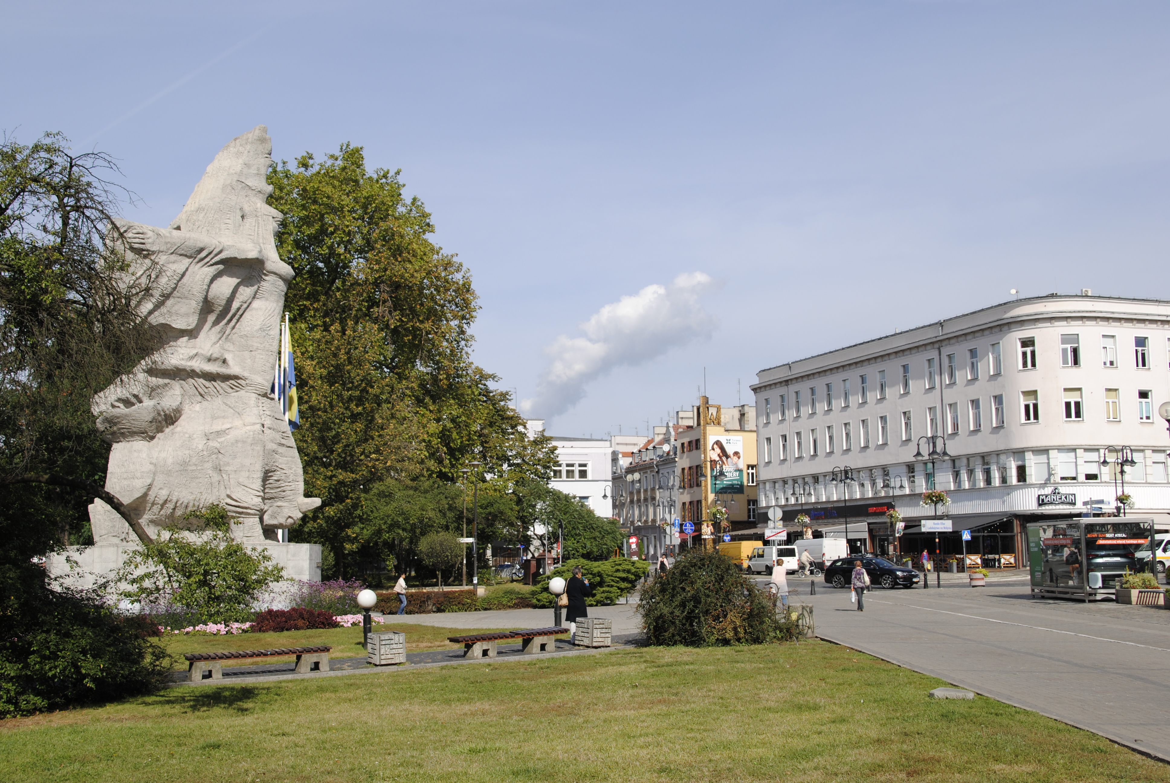 Wolnosci-Platz und Oppelner Nike in Oppeln